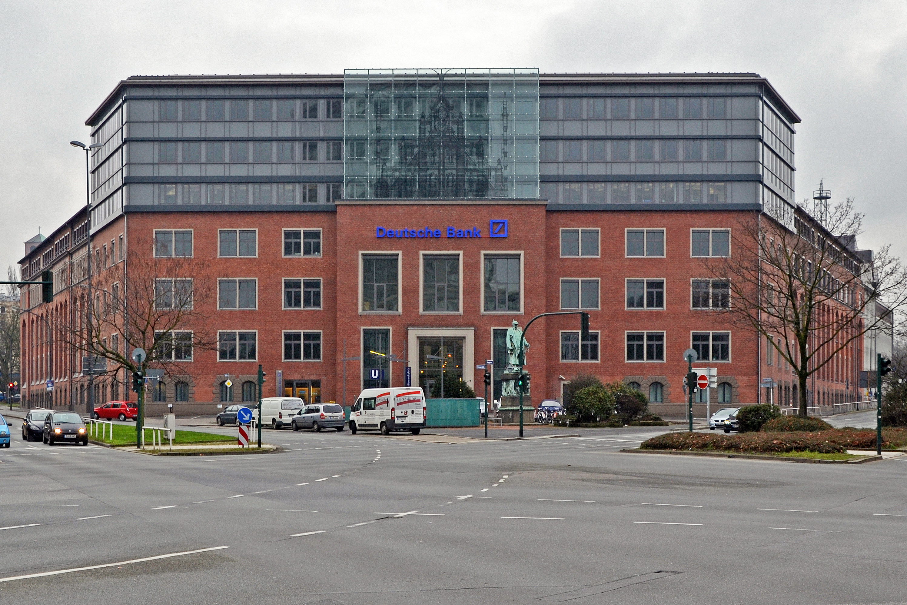 ehem. Direktionsgebäude Essen, einst Reichsbahn-, später Bundesbahndirektion